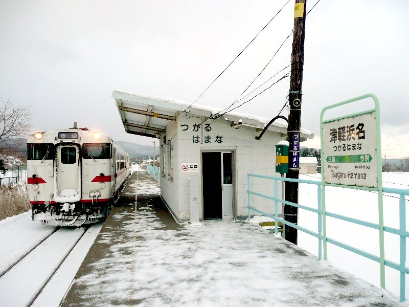 Tsugaru-Hamana station